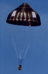 Reservefallschirm T-11R bei einem Testabwurf mit Puppe über dem Yuma Proving Ground.